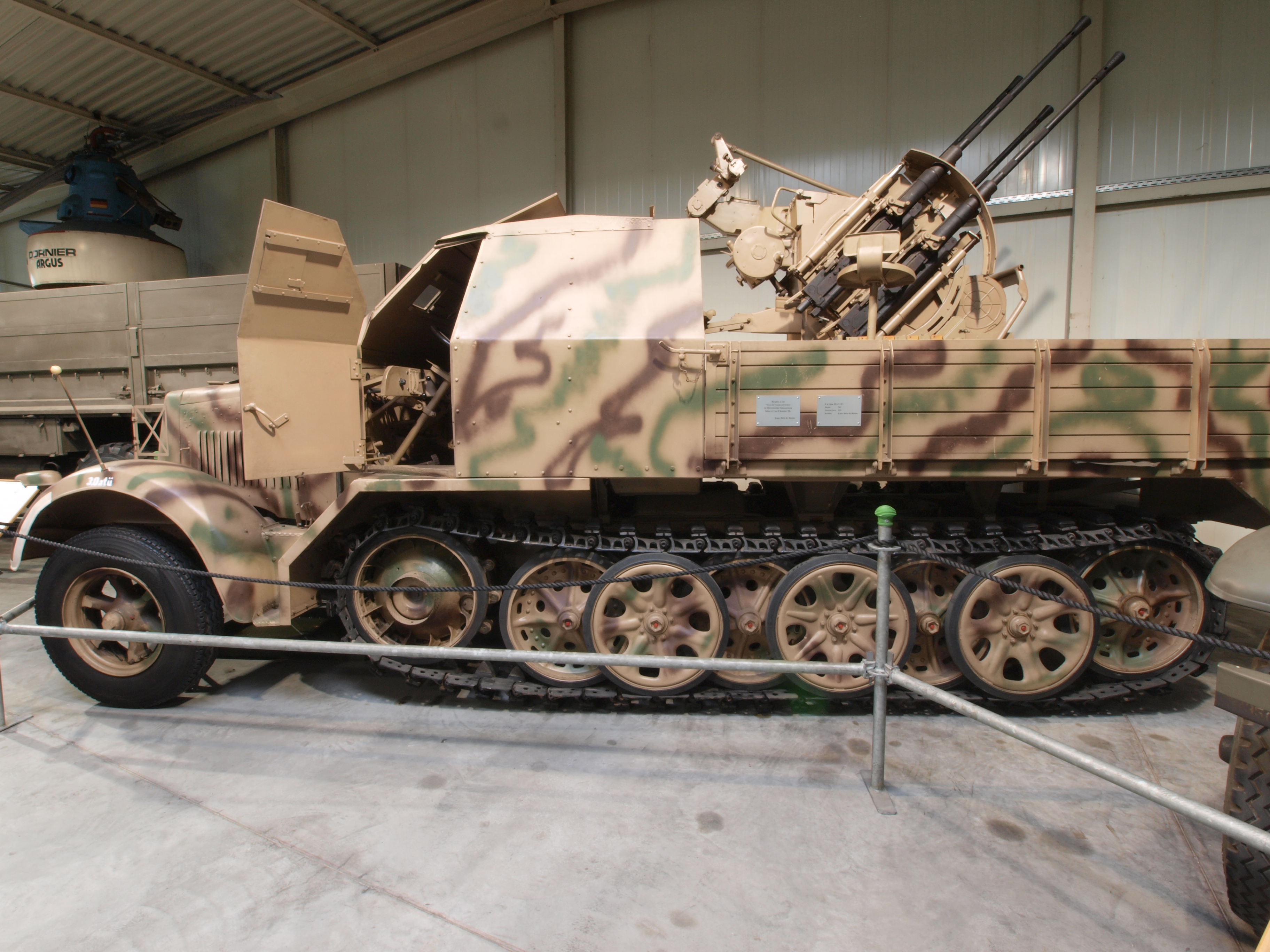 SdKfz 101 KM m 11 with 2cm Flak-Vierling